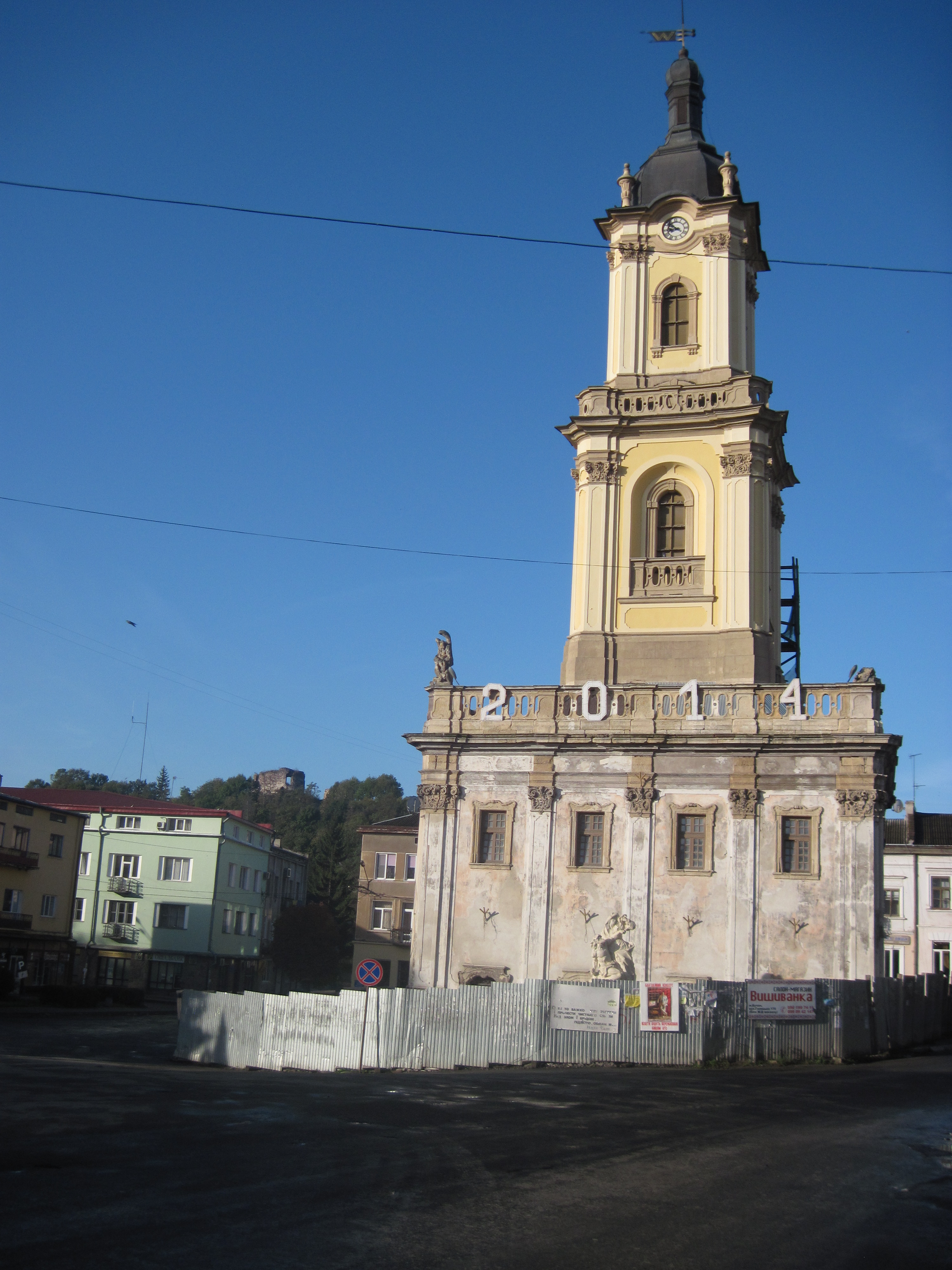 Ратуша, Бучач, осінь 2014